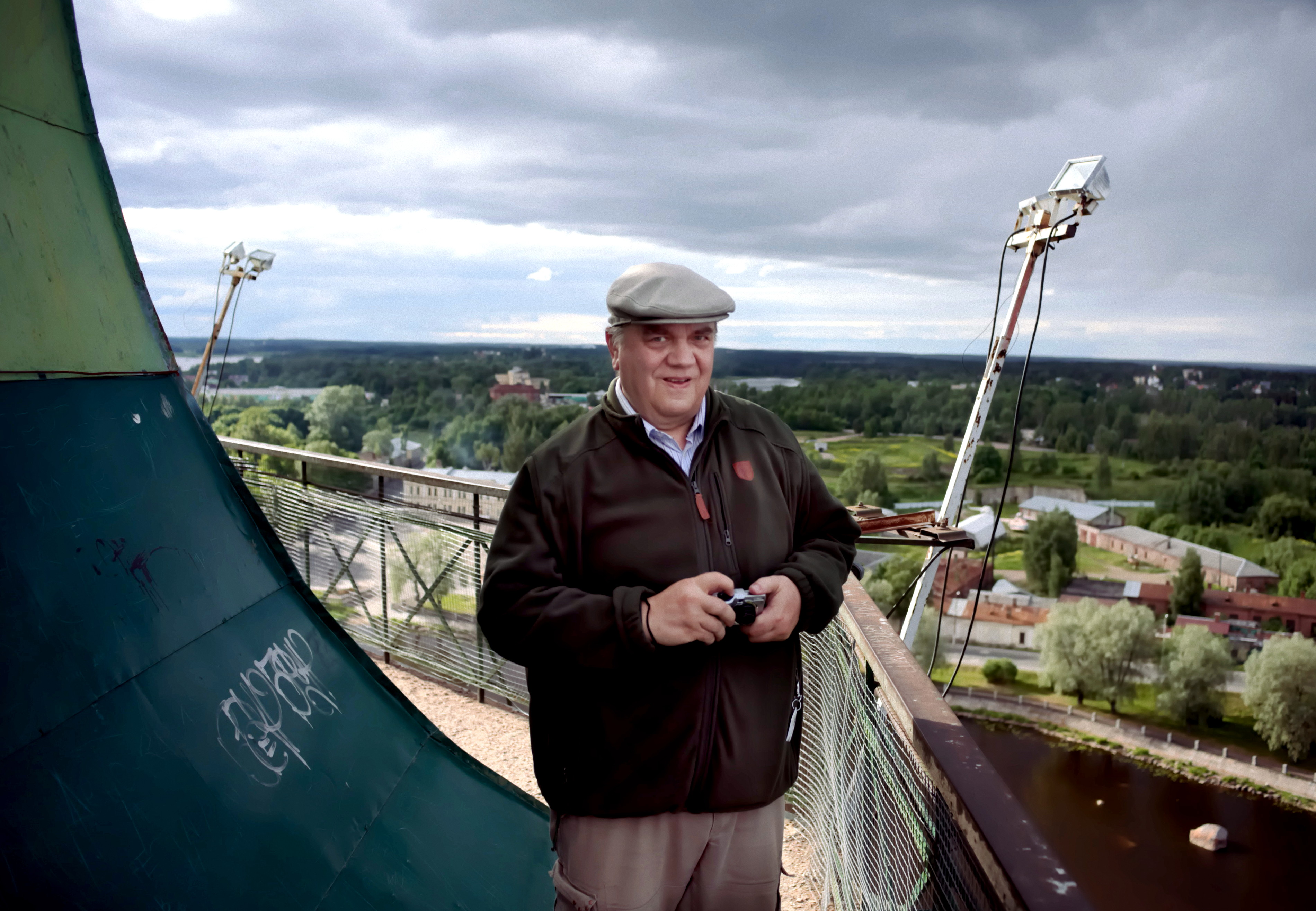 Lauri Kosonen Viipurin linnan tornissa 5.6.2016